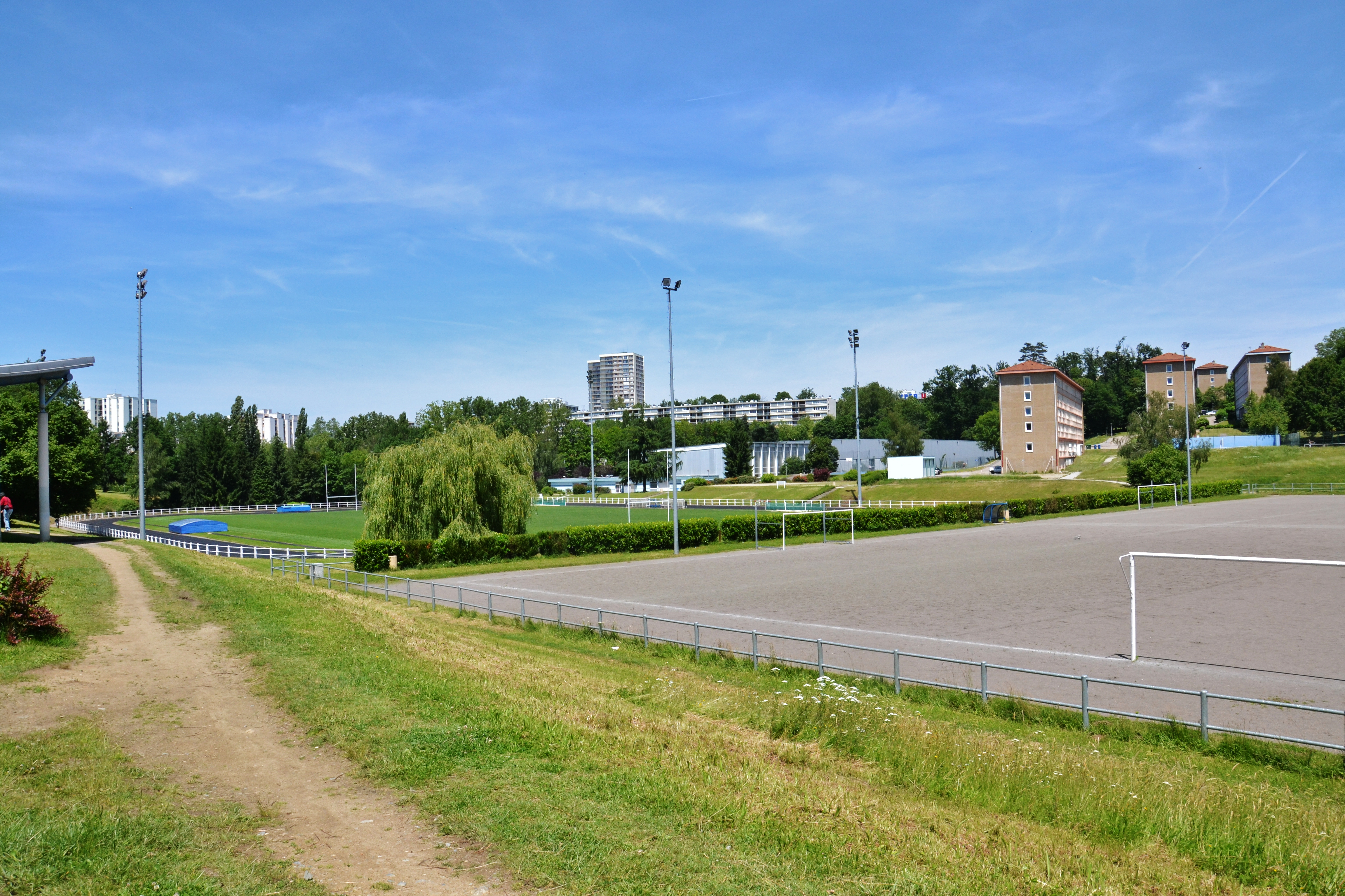 Les installations sportives et les immeubles du campus de la Borie, Limoges (Haute-Vienne, France)